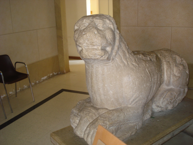 Leno stiloforo marmoreo nel salone d'ingresso del Comune di Leno